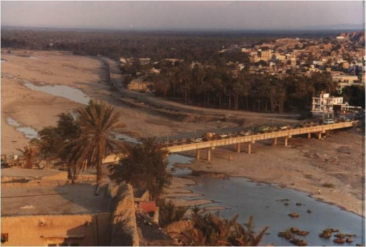 پل میناب